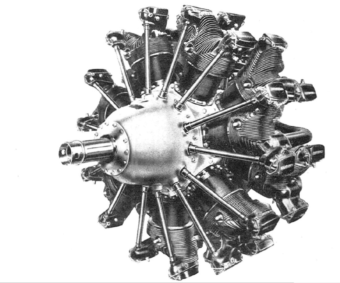 Hisapno-Suiza 14AA, document d'époque